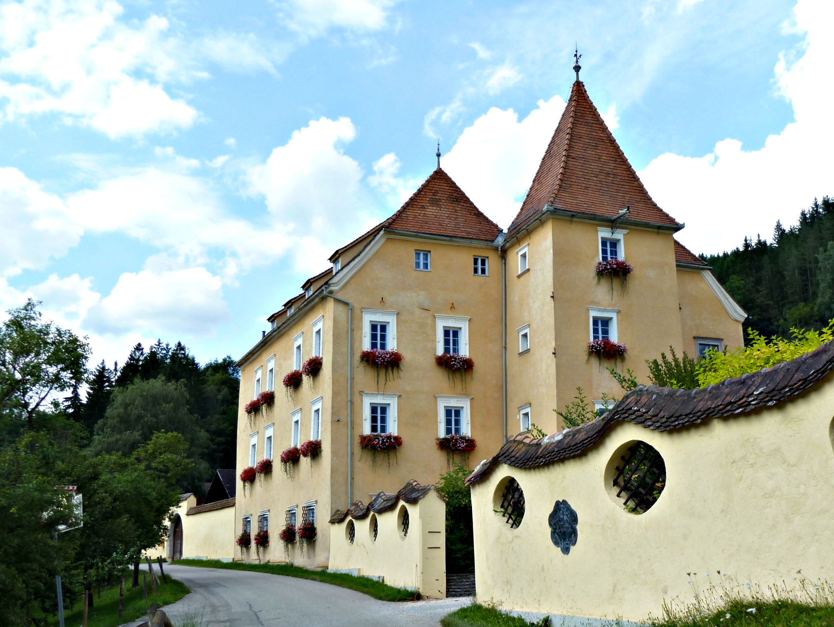 Schloss Oberdorf, genannt Stockschloss